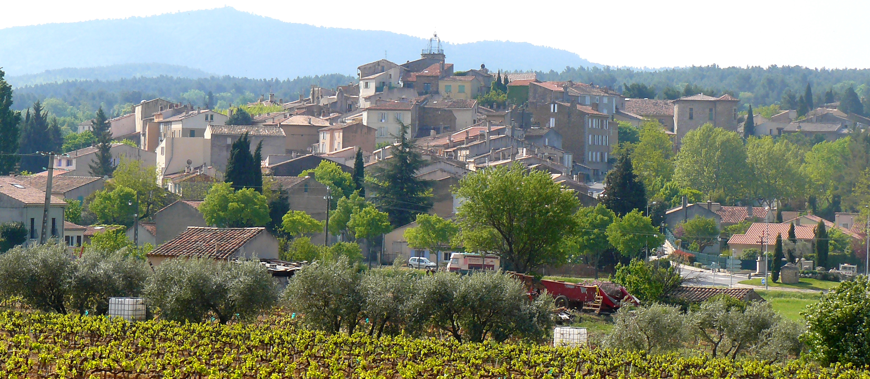 Vue de Peynier depuis le cimetière